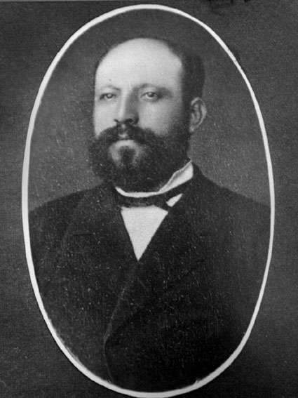 Христо Стоянов (1842-1895)